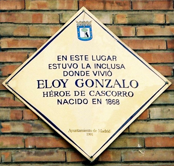 Calle del Mesón de Paredes, Madrid, España. En el nº 66 estuvo la inclusa de Madrid donde fue confiado el recién nacido Eloy Gonzalo el primero de diciembre de 1868. Esta placa informa del hecho.